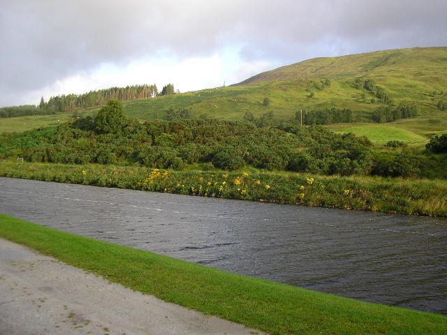 Caledonian Canal